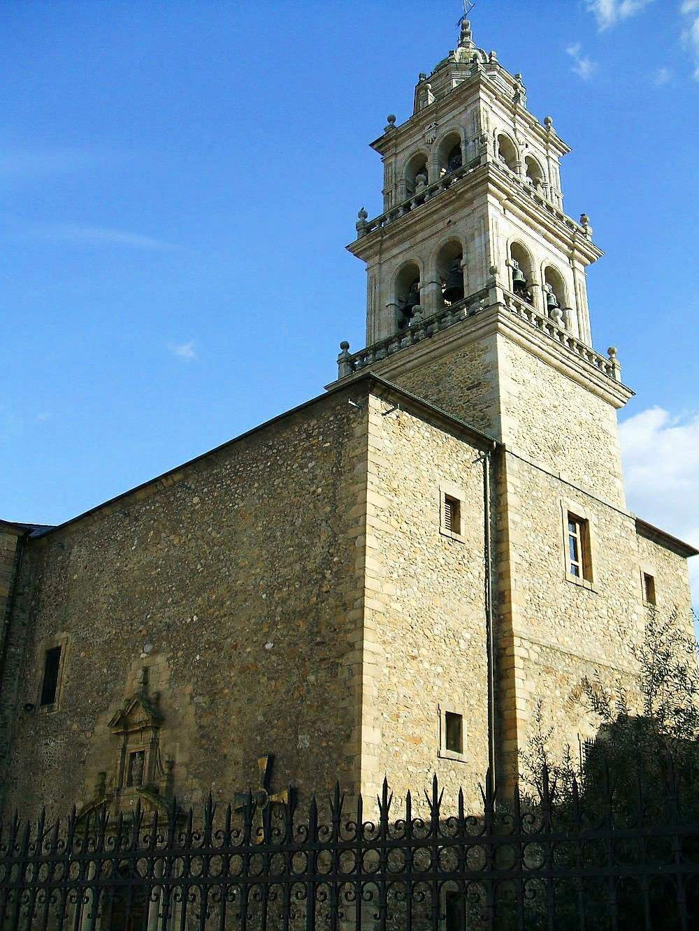 Ponferrada - Basilica de Nuestra Señora de la Encina